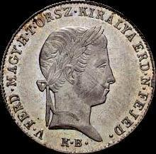 10 krajczár 1848 - obverse